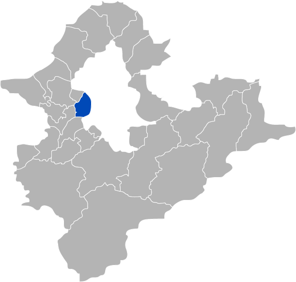 中華民國臺灣省臺北縣三重市，KaurJmeb為編寫臺北縣三重市所繪製。